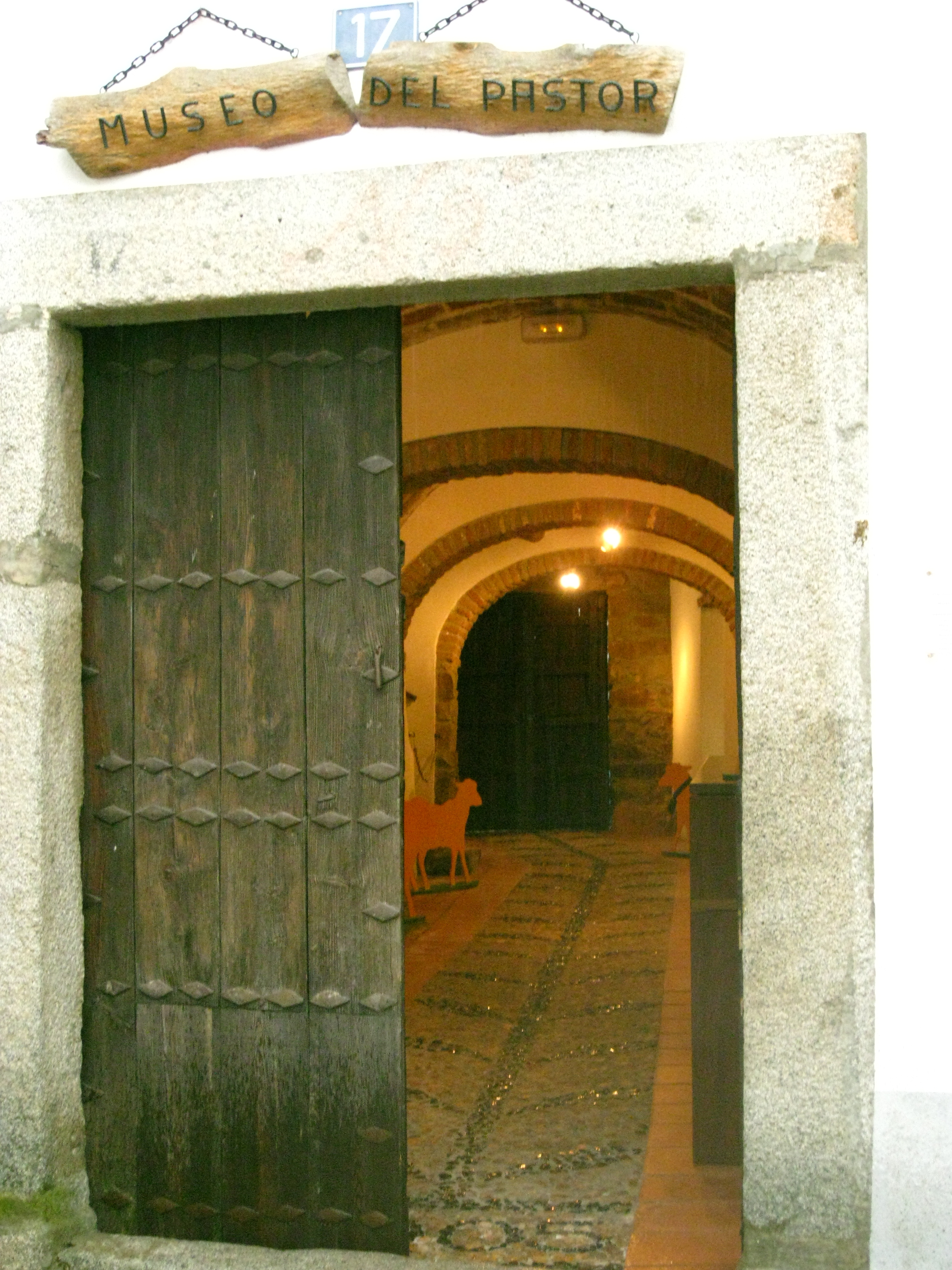 Museo del Pastor. Noviembre de 2011